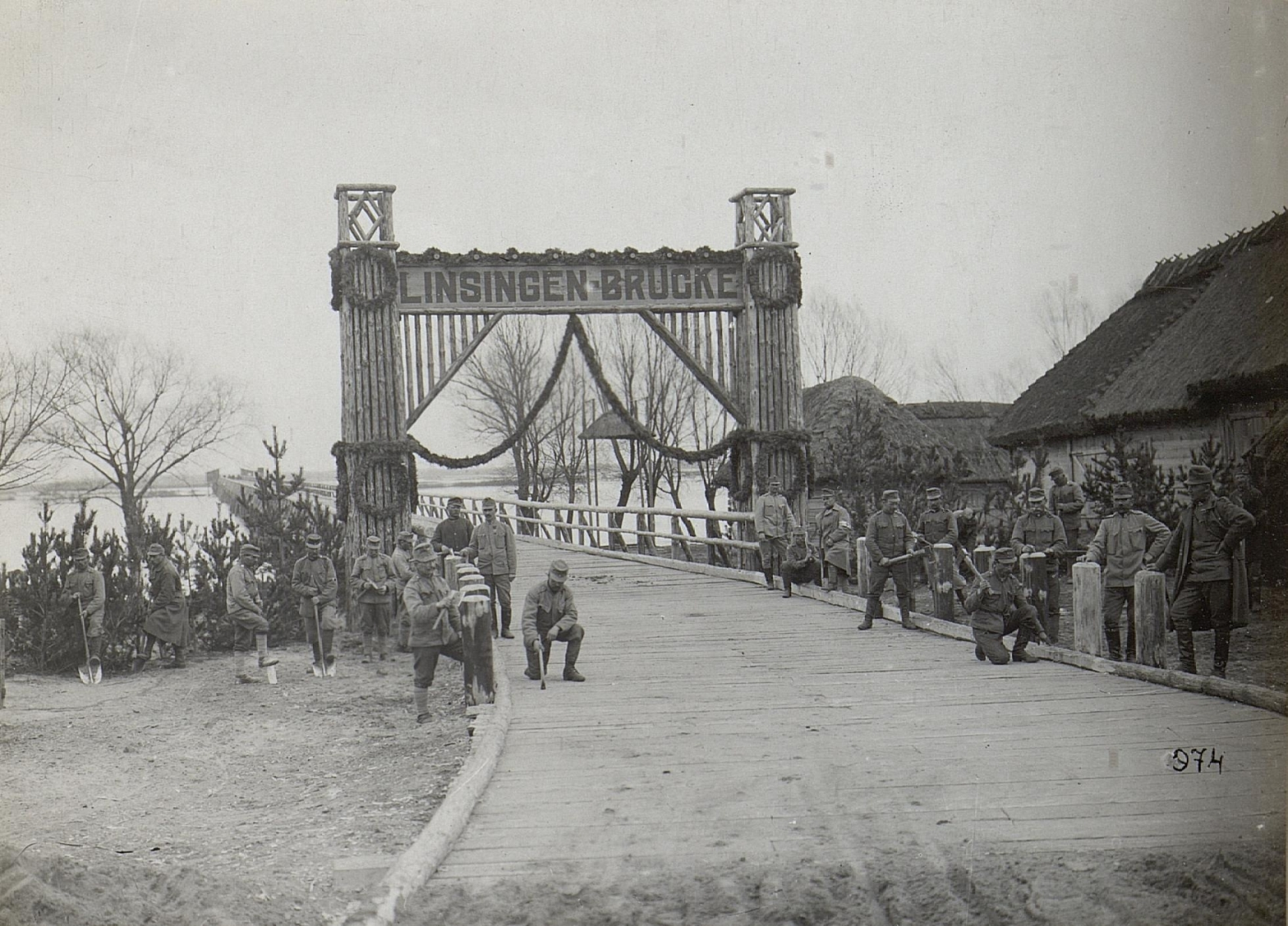 Eröffnung der Linsingen Brücke, wahrscheinlich nahe Kowel